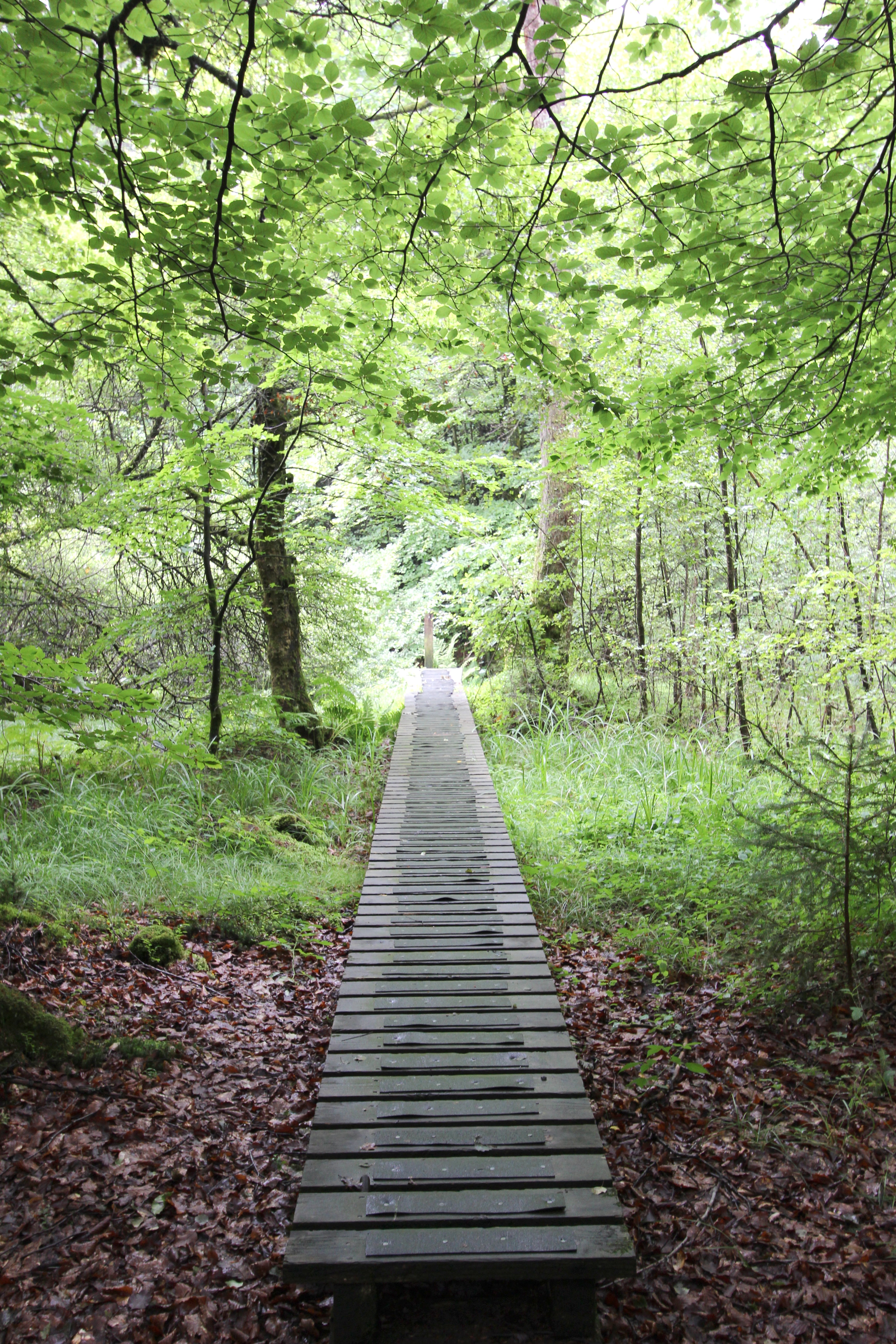 54597 Ormont, südöstlich des Ortes, im Flur "Baumklosenhau". Die Prümquelle ist eine Tümpelquelle. Sie befindet sich in einem kleinen Sumpfgebiet im Arenberger Forst. Von hier aus fließt sie als Rinnsal in südliche Richtung ab. Die Prüm mündet nach ca. 90 km bei Minden in die Sauer. Kurioserweise liegt die Mündung der Prüm auf demselben Längengrad wie die Quelle und fließt somit exakt südlich der Quelle. Aufnahme von 2017.